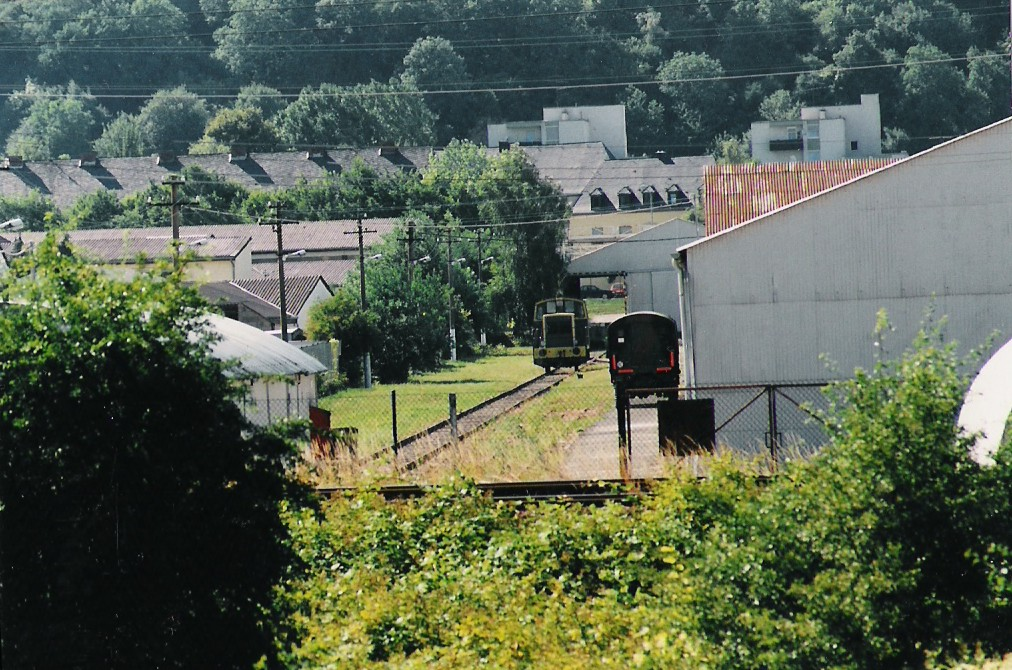 Blick auf den Gleisanschluss der französischen Streitkräfte in Trier-Euren an der Trierer Weststrecke 1996. Im Hintergrund eine französische Rangierlok der Baureihe Y7100. Im Vordergrund sind die Gleise der Trierer Weststrecke zu sehen.